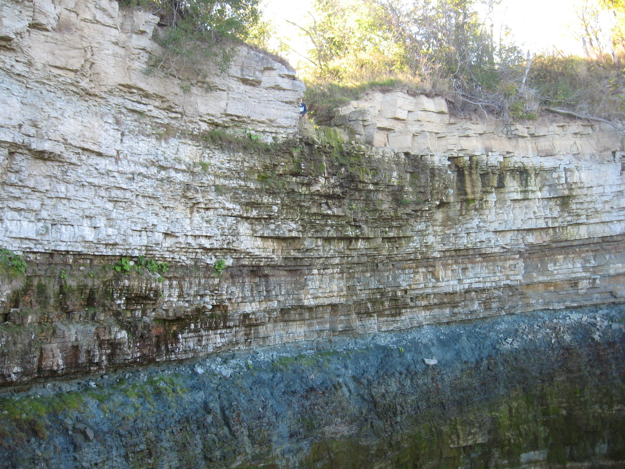 Vallaste joa kuiv säng